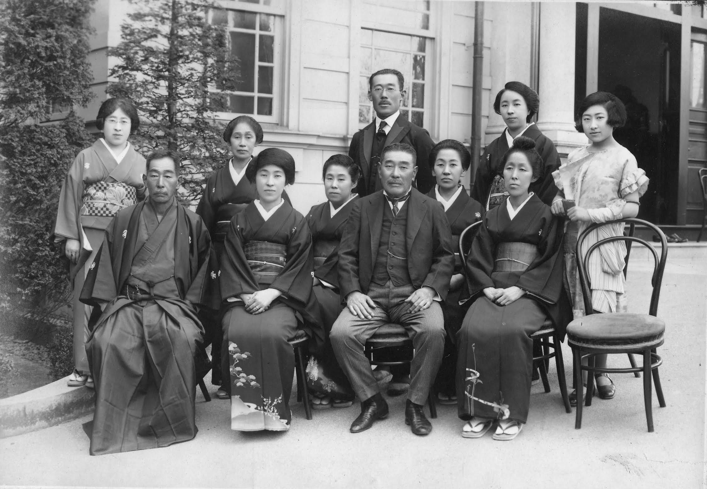 前列左から寛正、立花理子、寛治、寛治妻 中列左から貞子、敏子 後列左から艶子（鑑徳夫人）、千代子（寛正夫人）、鑑徳、西高辻ハル子（太宰府天満宮西高辻信夫夫人）、文子（鑑徳長女）